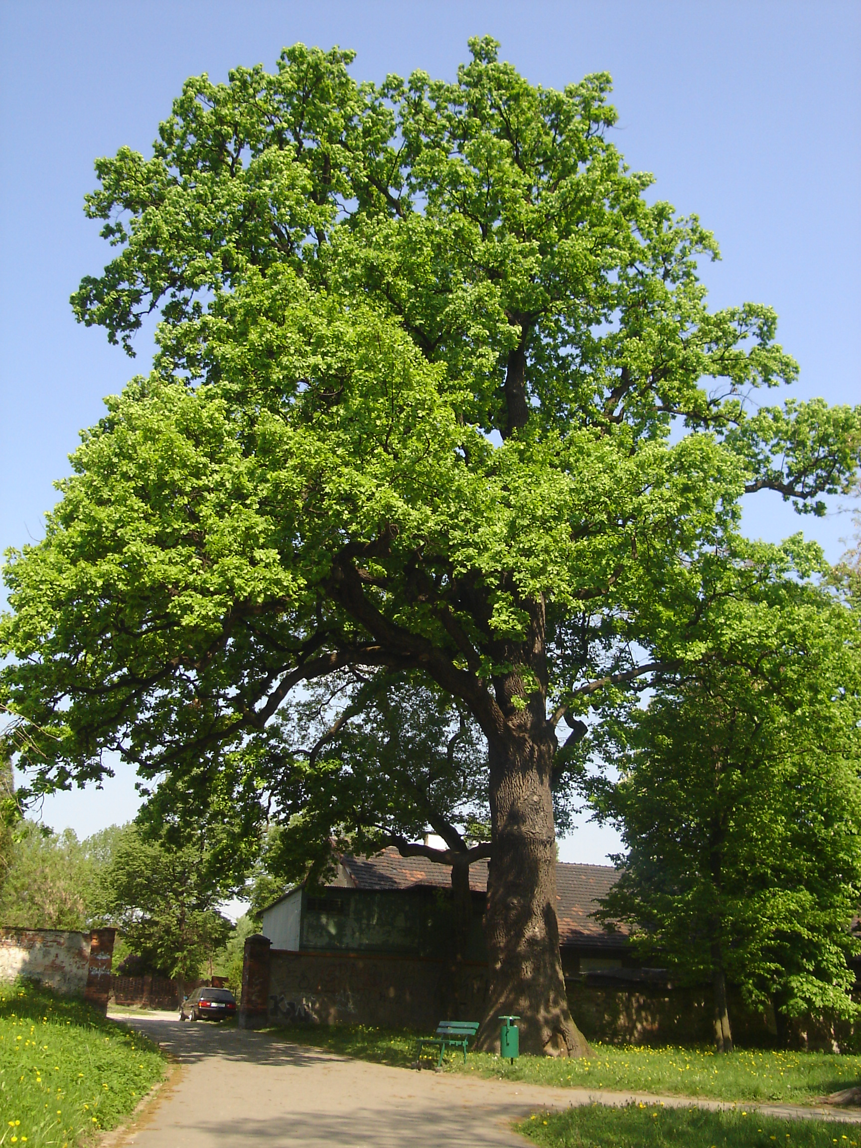 Prokocim - pomnik przyrody